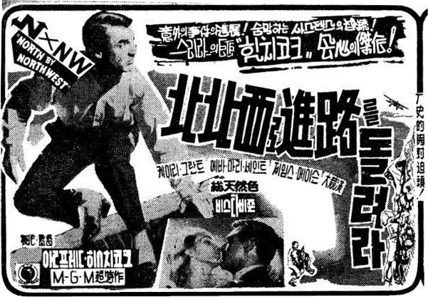 북북서로 진로를 돌려라 영화 포스터